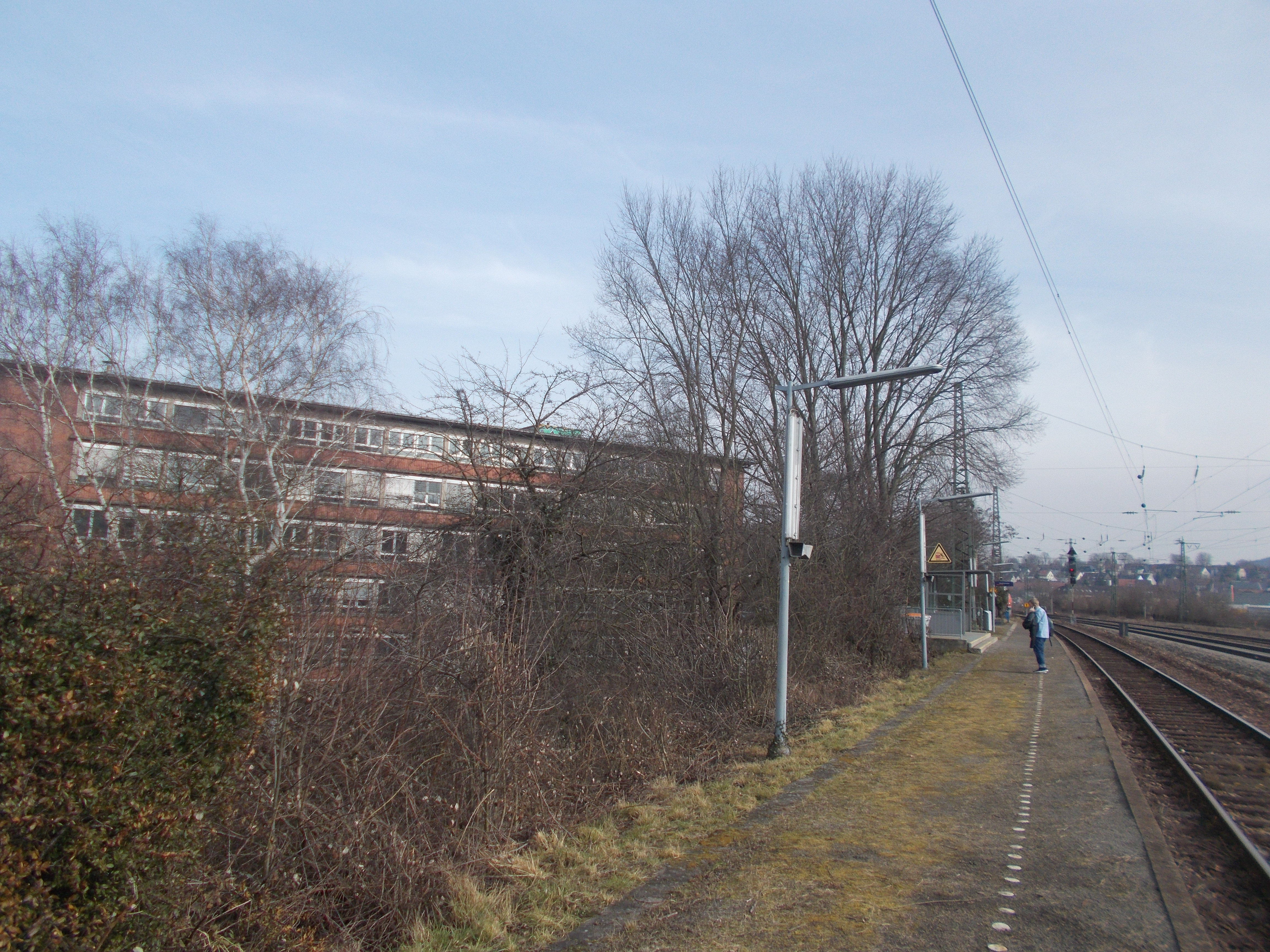 Haltepunkt der Bahnstrecke Kaiserslautern-Lauterecken am ehemaligen Pfaffwerk Kaiserslautern